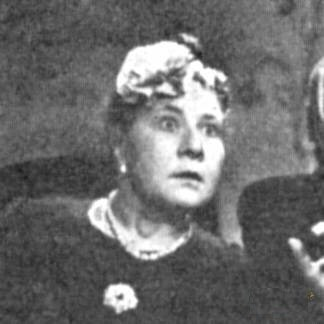 Darja Hajská (1911-1981), česká zpěvačka, herečka, spisovatelka a dramatička, autorka knížek a divadelních her pro děti